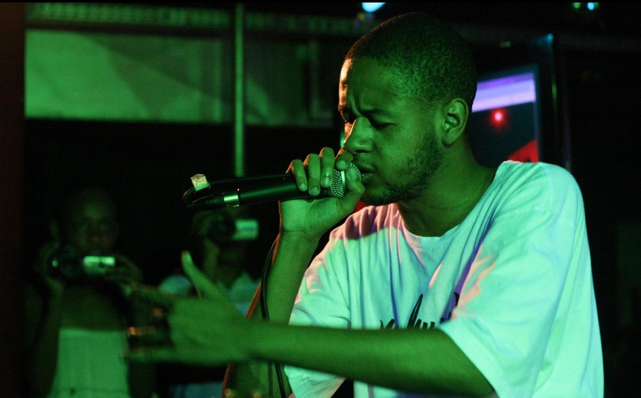 Festa Quilombo Hip Hop reuniu Emicida e Marechal no mesmo palco. Os MCs atenderam pedidos do público, que apareciam nas telas instaladas no palco, e faziam freestyle com os temas sugeridos. A festa lotou o Hole Club, na Rua Augusta (Jardins, SP), em uma noite de muito calor no dia 14 de novembro. FOTO: JANAÍNA CASTELO BRANCO/siteNOIZ